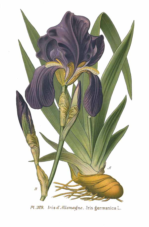 Iris germanica L.